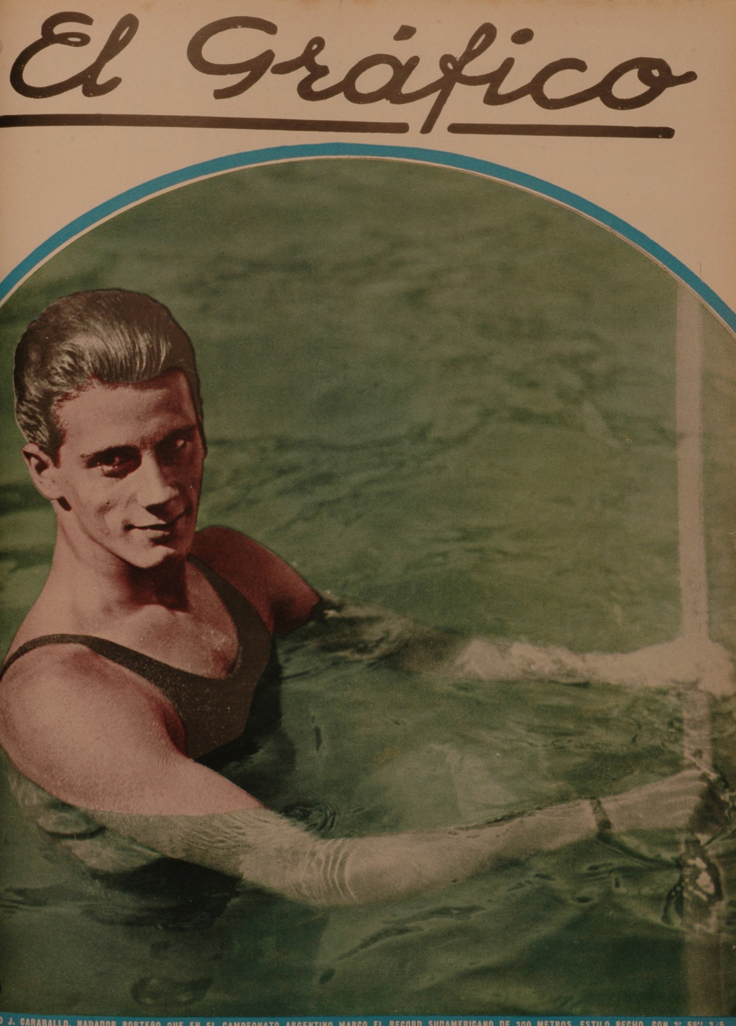 El Grafico del 05 de Marzo de 1932. Edicion 660